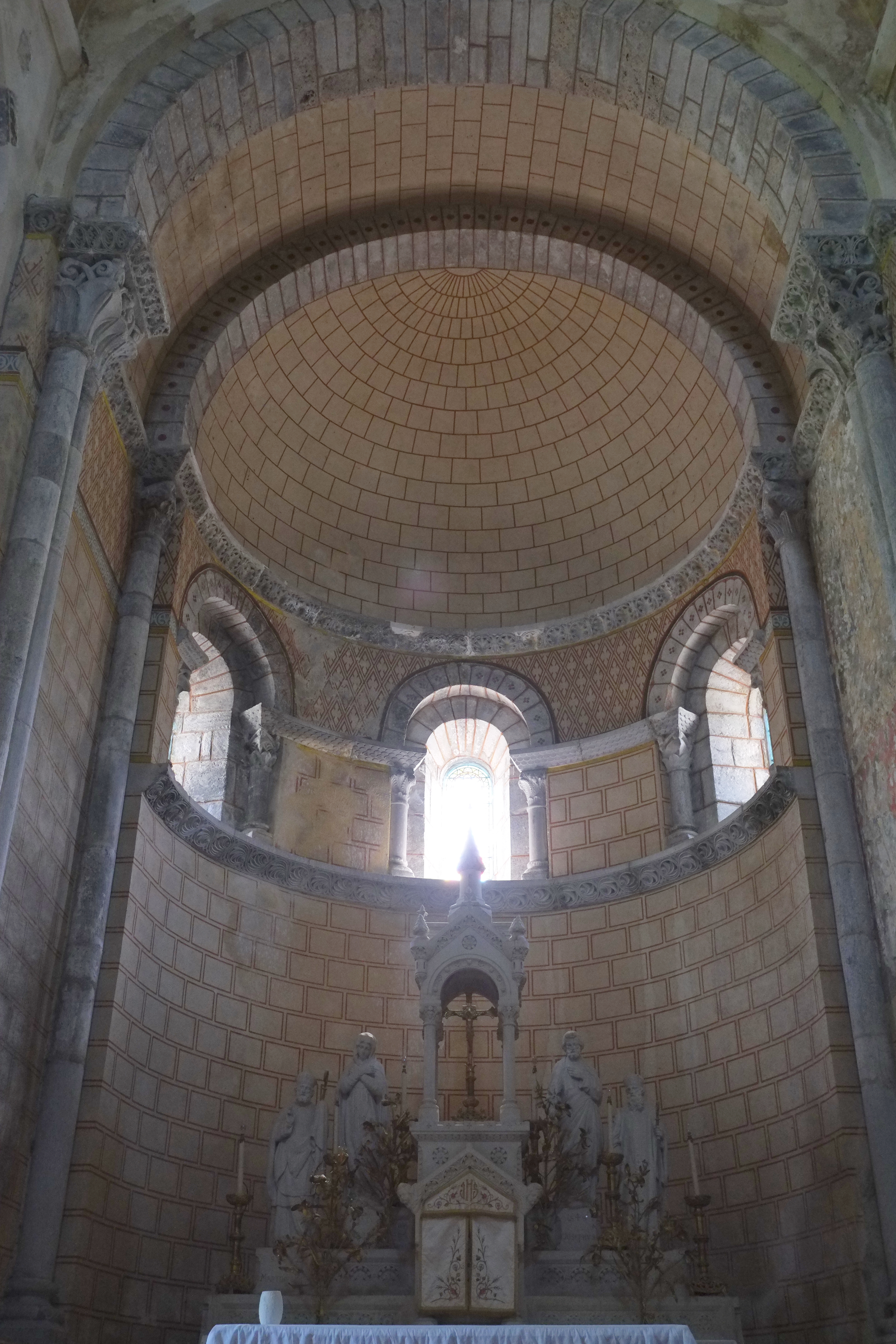 Kirche Saint-Martin in Unac im Département Ariège der Region Midi-Pyrénées (Frankreich)